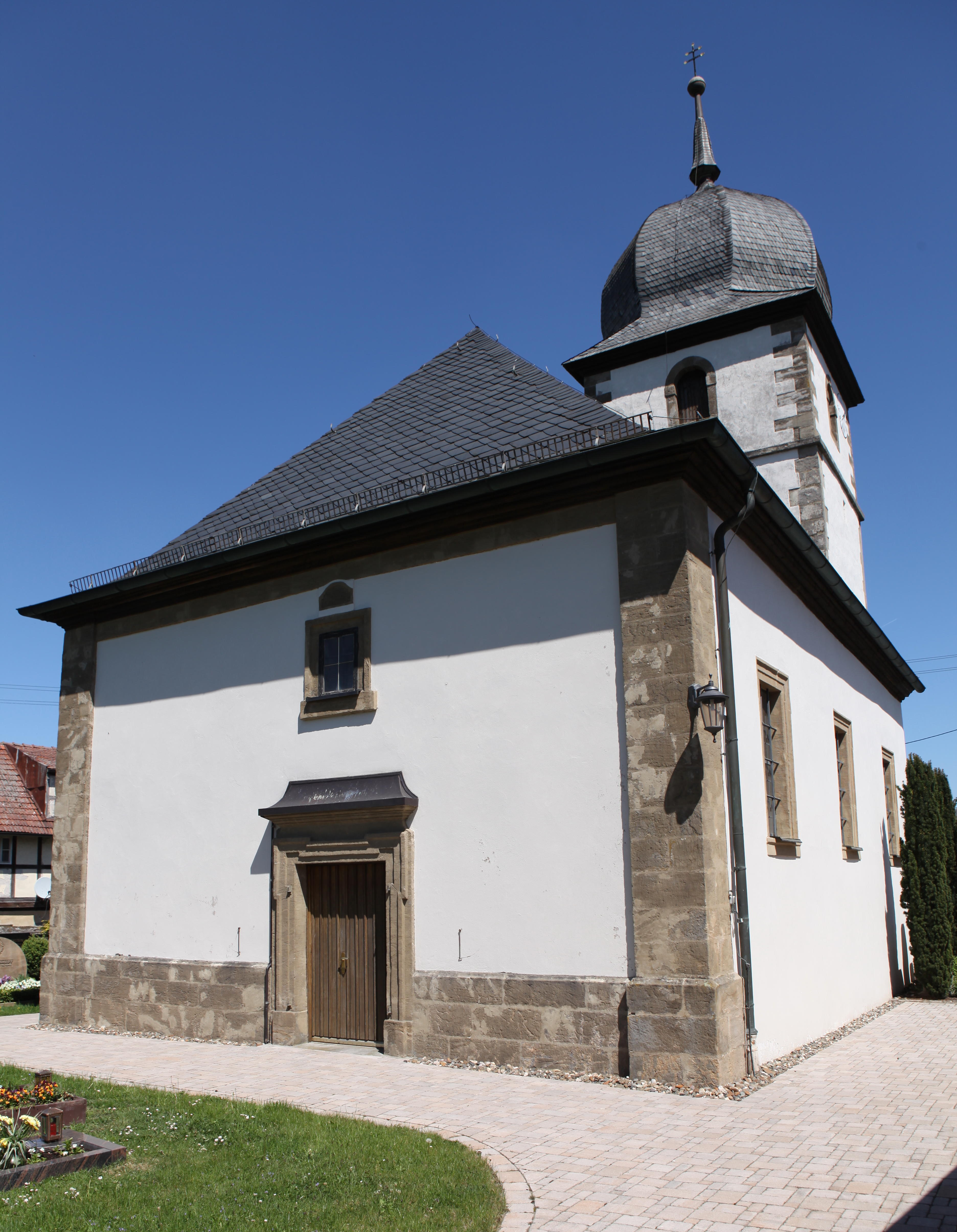 Katholische Filialkirche St. Antonius Eremita, Gleismuthhausen, Landkreis Coburg